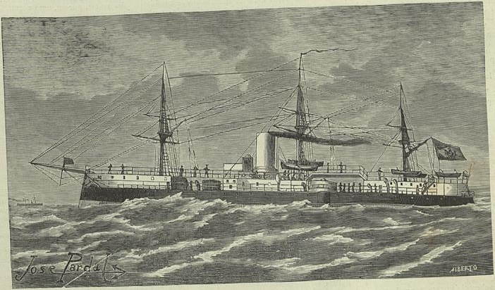 O Couraçado Aquidabã